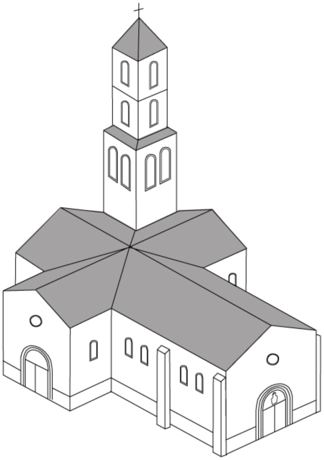 Iglesia de San Salvador (Tudela), desaparecida; reconstrucción del edificio para principios del siglo XIX.